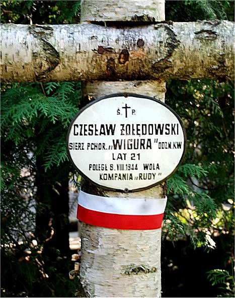 Grób na Powązkach Wojskowych w Warszawie